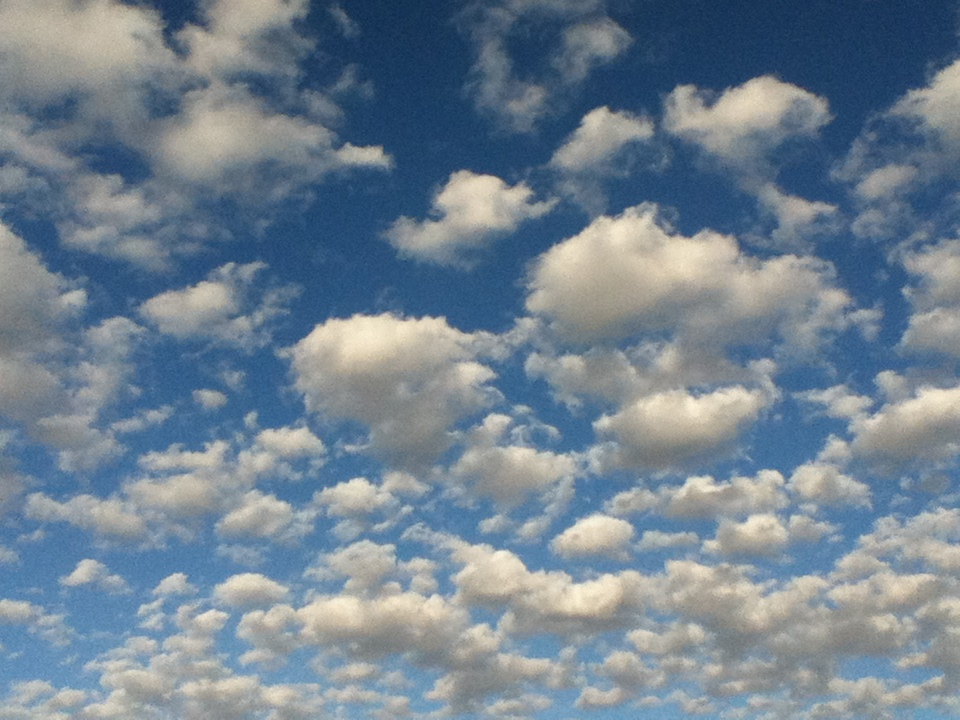 Nubes en la ciudad de Hermosillo, Sonora.